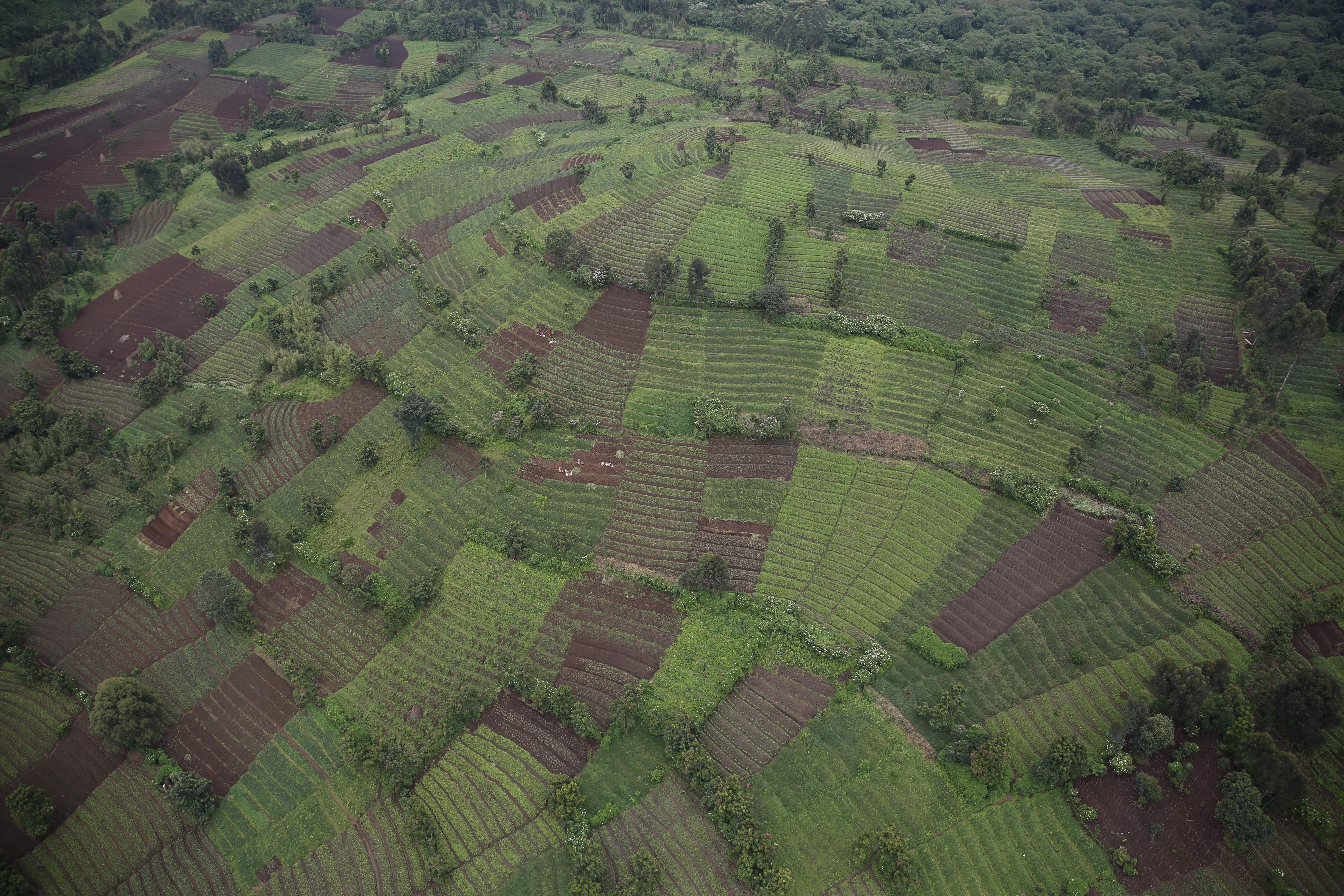 photo MONUSCO / Abel Kavanagh